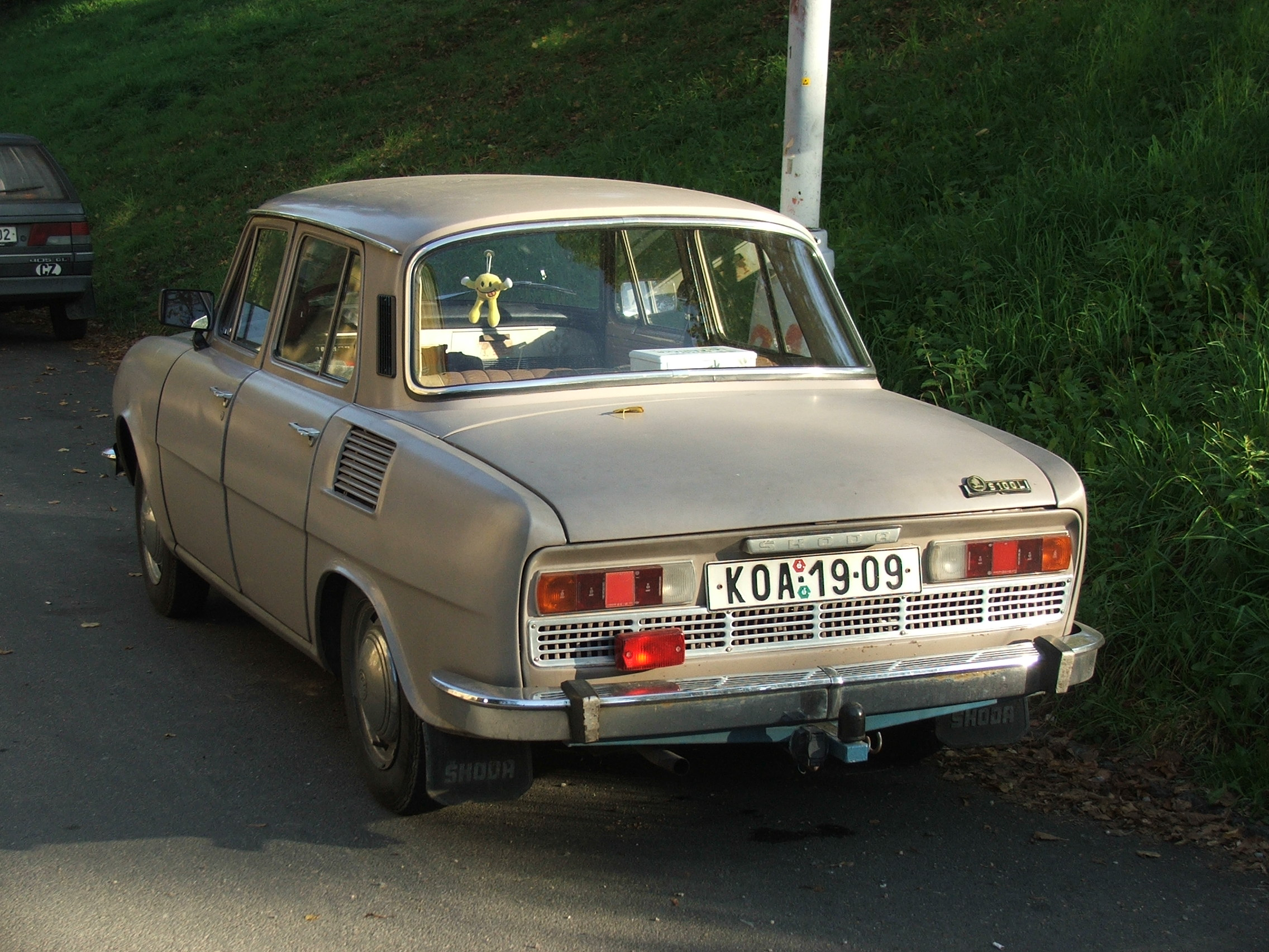 Škoda 100 as seen in 2007 in Kolín